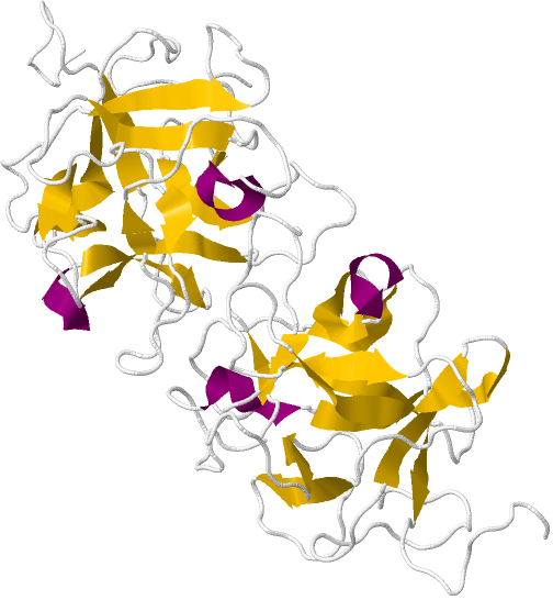 Miraculin